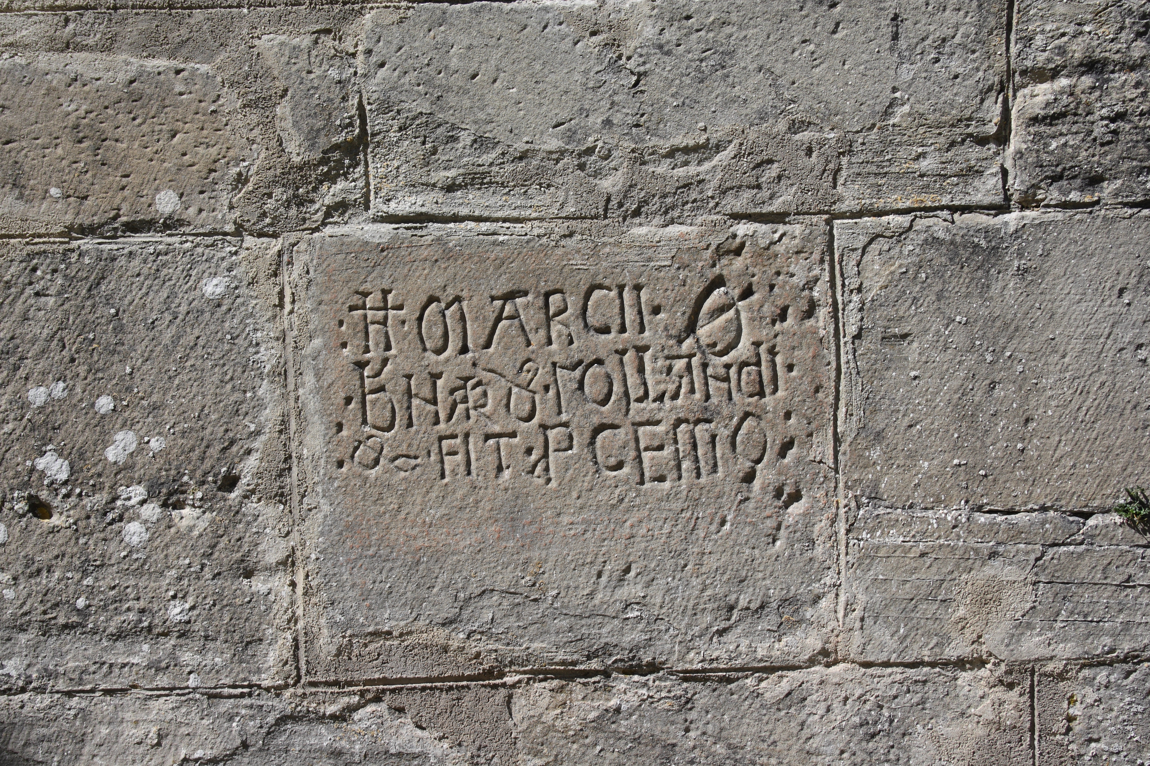 katholische Kirche Saint-Pierre in Marnans